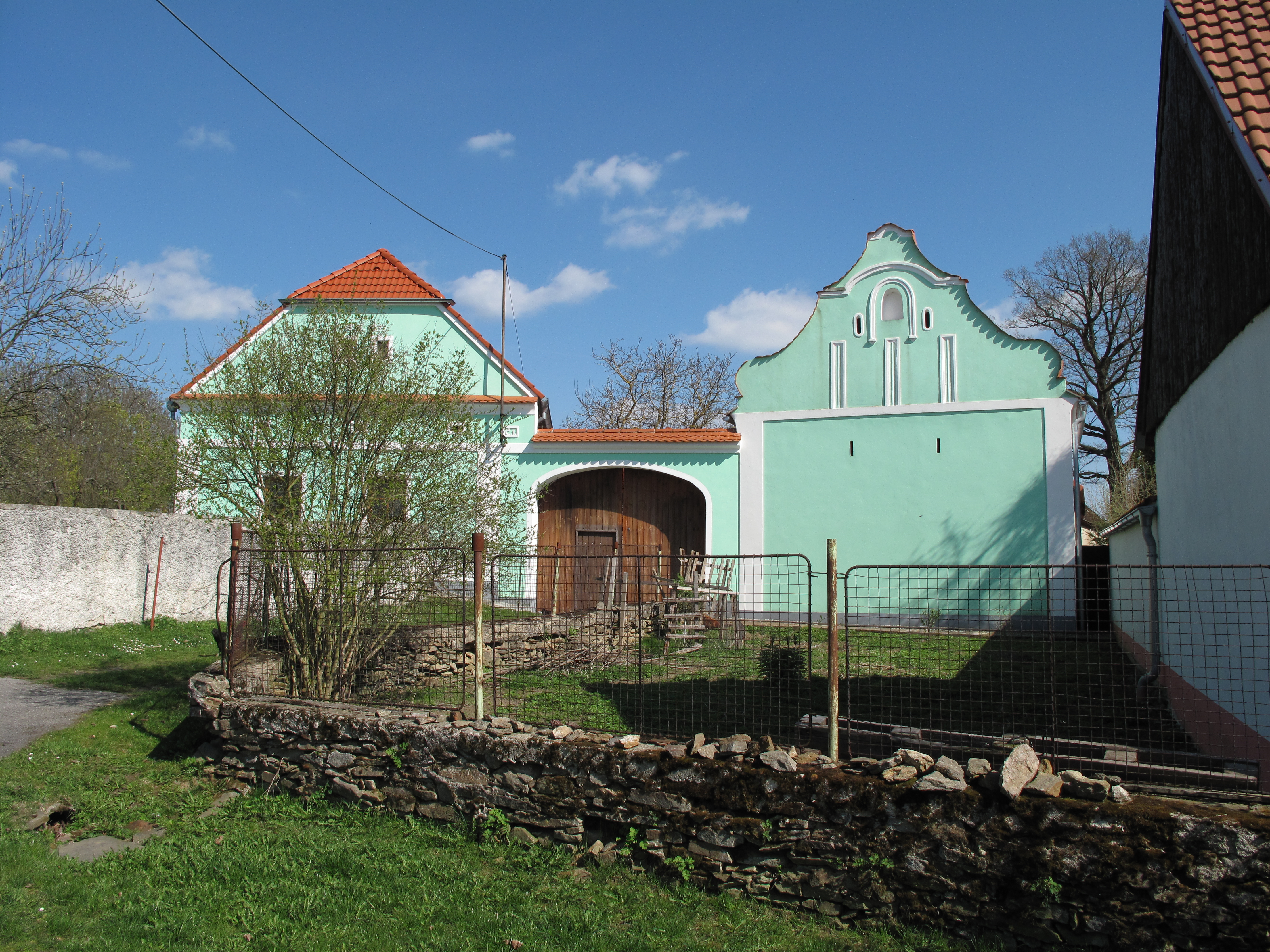 Statek v Horních Kněžekladech. Okres České Budějovice, Česká republika.